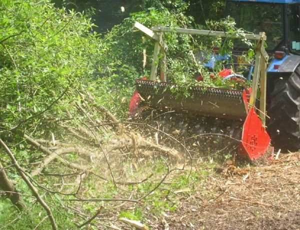 мульчер перебиває дерева